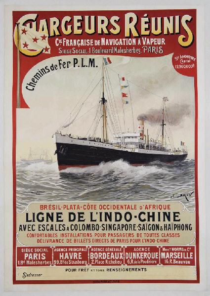 Cette affiche illustre l'époque des paquebots au tout début du XXe siècle